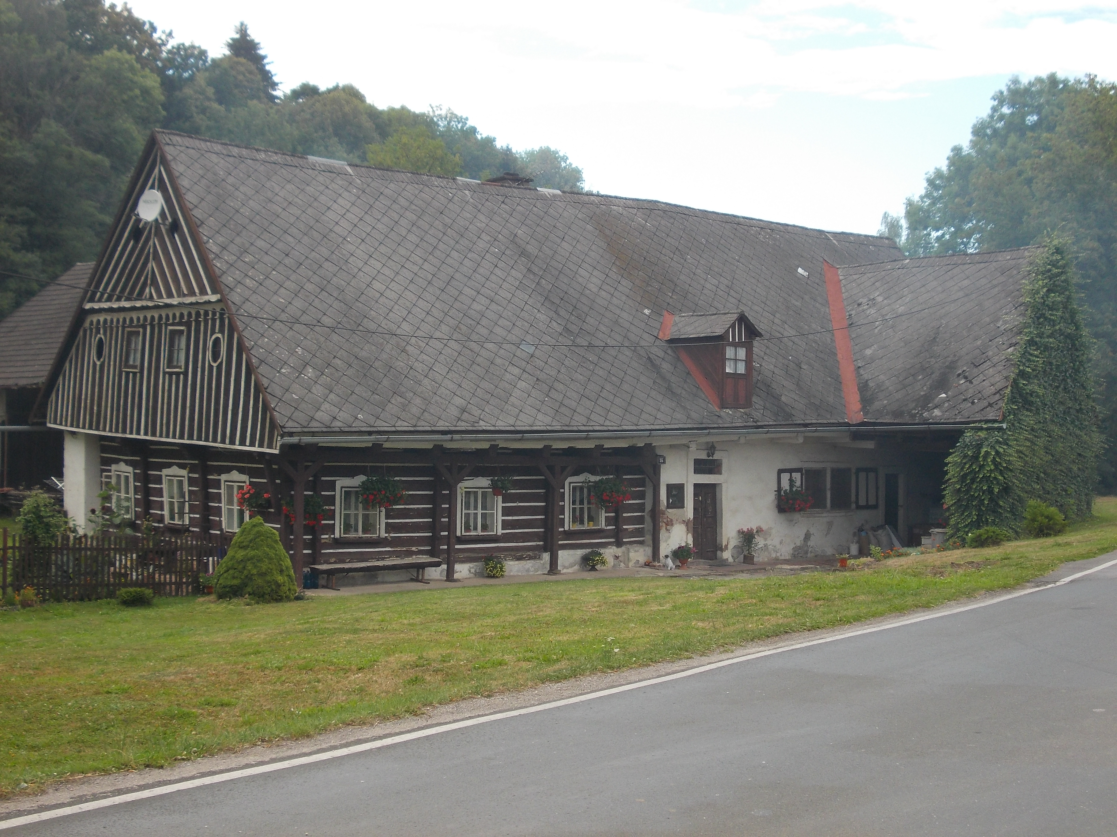 Dolní Lánov - dům č.p. 96